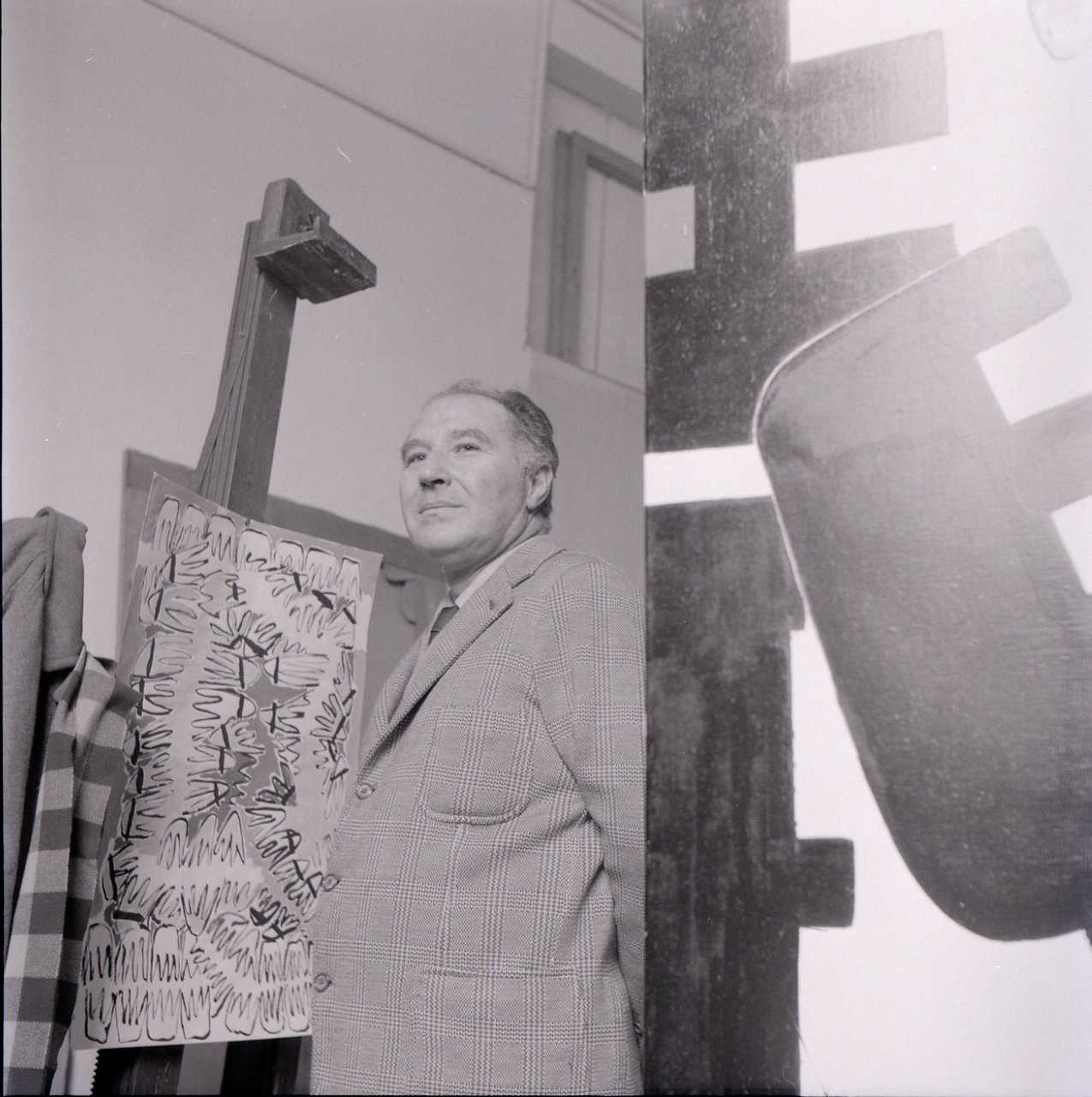 Servizio fotografico : Italia, 1972 / Paolo Monti. - Buste: 27, Fototipi: 30 : Negativo b/n, gelatina bromuro d'argento/ pellicola ; 6x6. - ((Serie costituita da 27 buste di carta, tenute insieme da una graffetta, identificate con i nn.: R4177, R4178, R4179, R4180, R4181, R482, R4183, R4184, R4185, R4186, R4187, R4188, R4189, R4190, R4191, R4192, R4193, R4194, R4195, R4196, R4197, R4198, R4199, R4200, R4201, R4202, R4203/4206. - Sulla busta R4177: "Capogrossi". - Fonte: Rubrica di Paolo Monti: Archivio 10x12 (ultimi numerati) - dal G1 al (s.d.), presso Archivio Paolo Monti